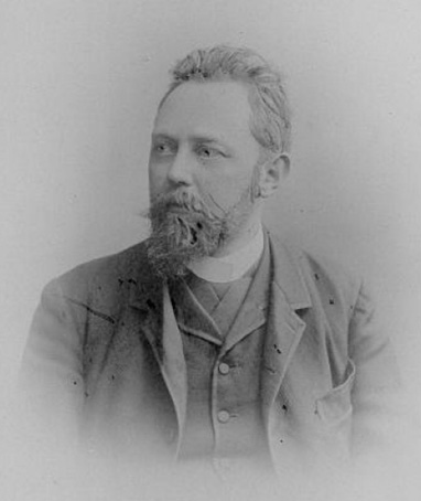 deutscher Architekt